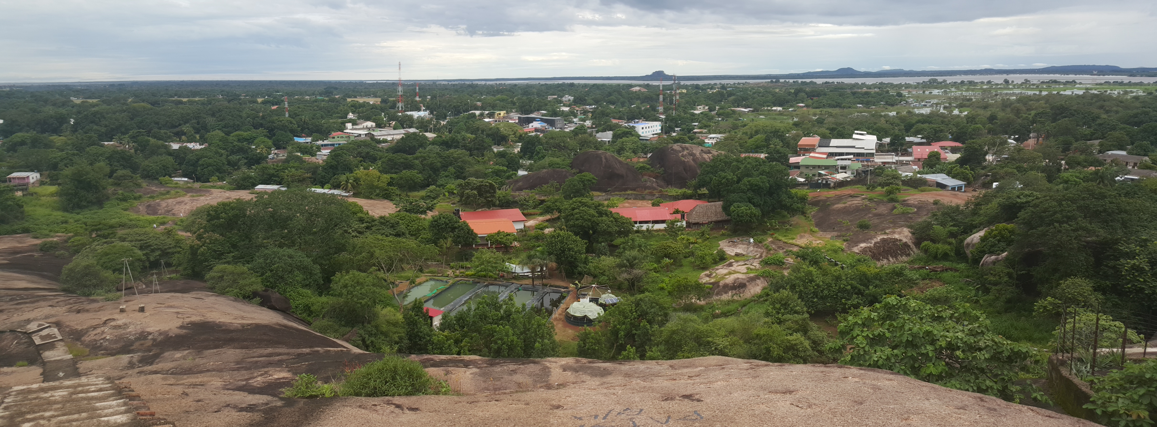 Puerto Carreño, Vichada, Colombia